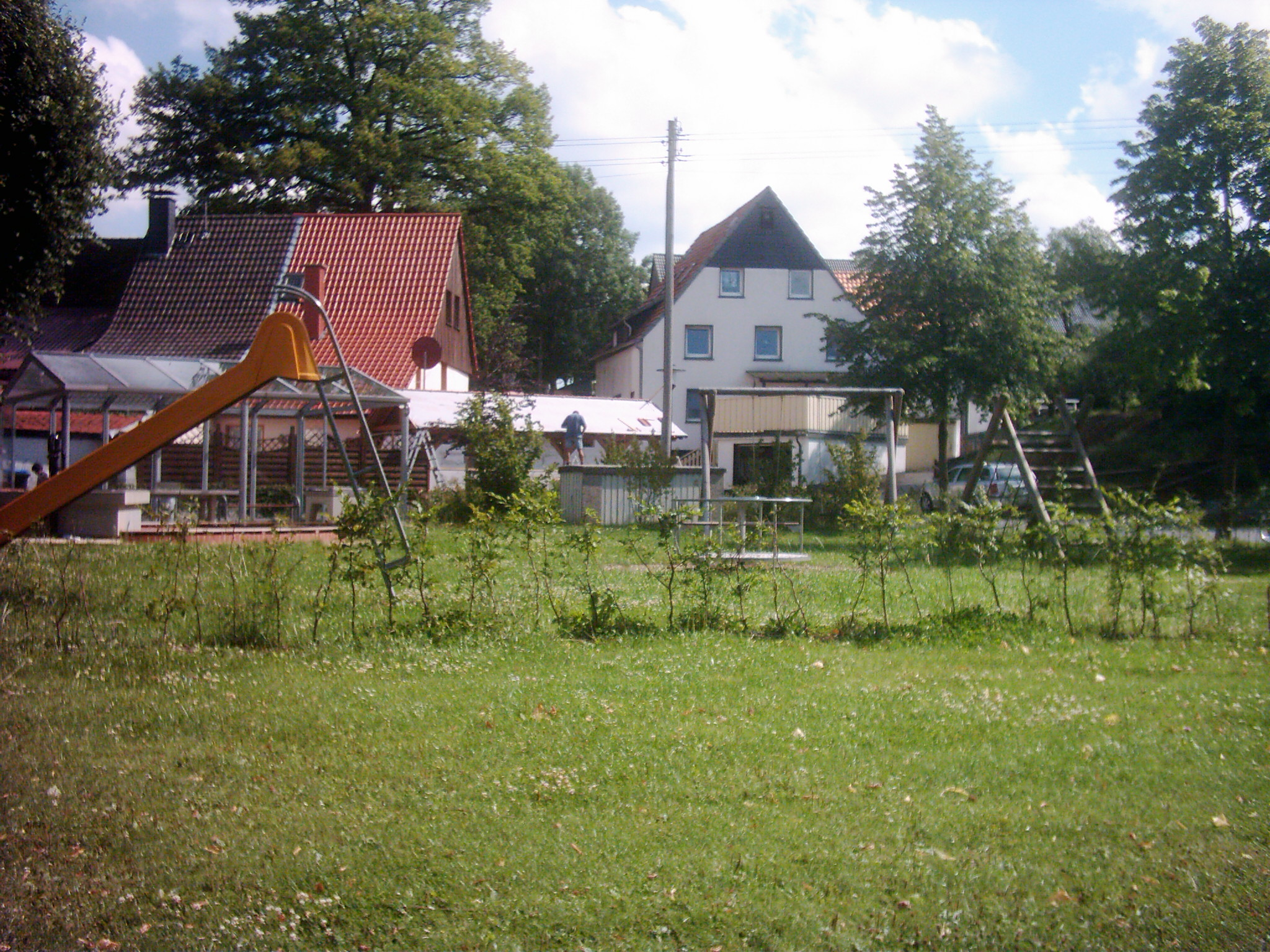 Ortsmitte der Gemeinde Möhnesee-Echtrop.